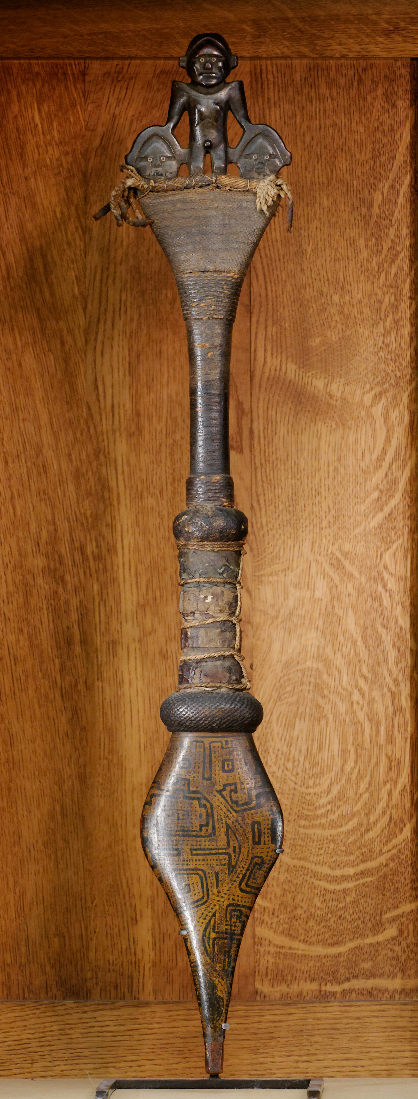 Bâton de cérémonie. Région des Guyanes ou bassin de l'Amazone, peut-être de la civilisation Arawak.